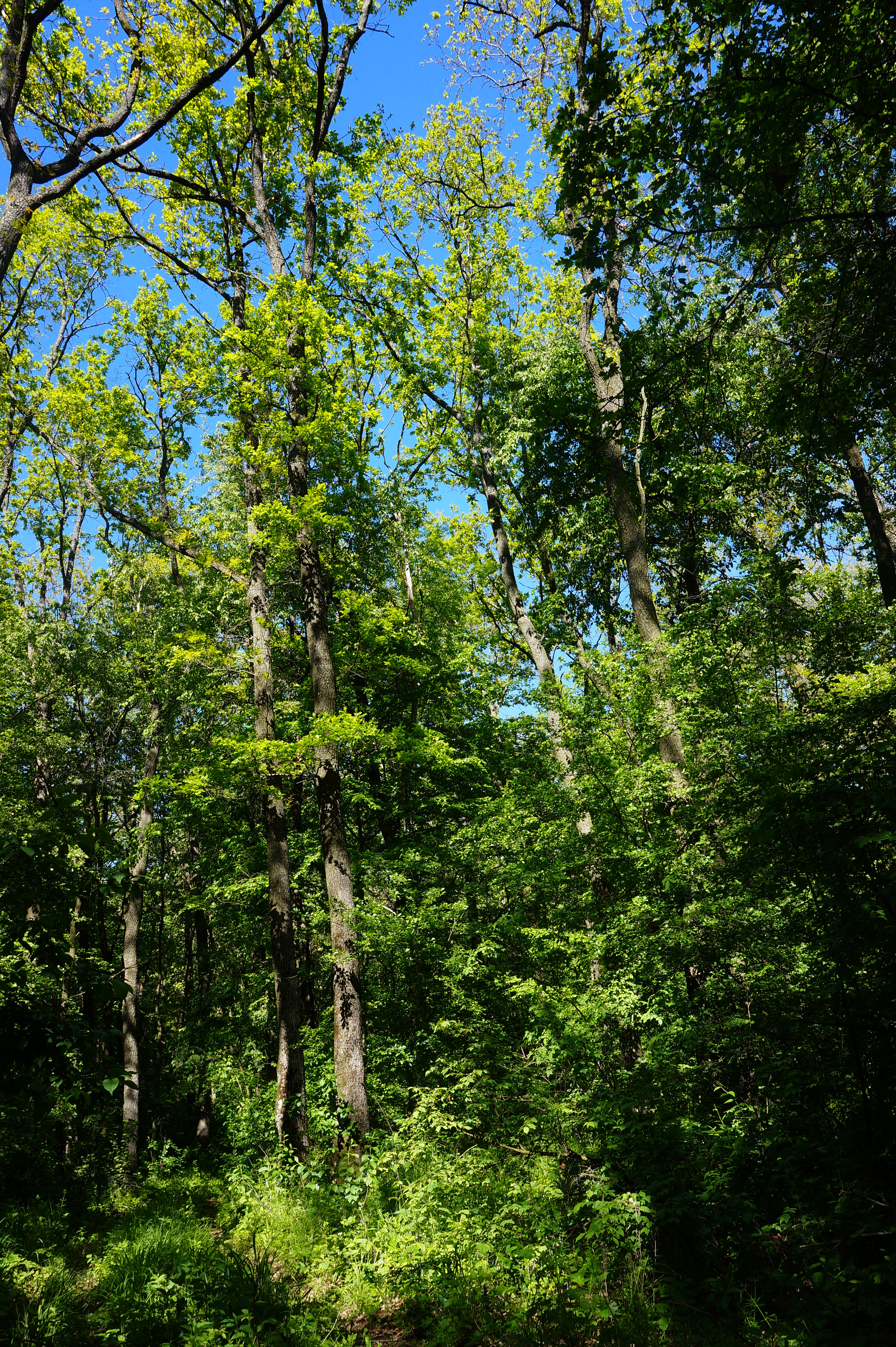 Євеліна, Ярмолинецький район, 3 км на захід від смт Ярмолинці Ярмолинецьке л-во кв. 25-29